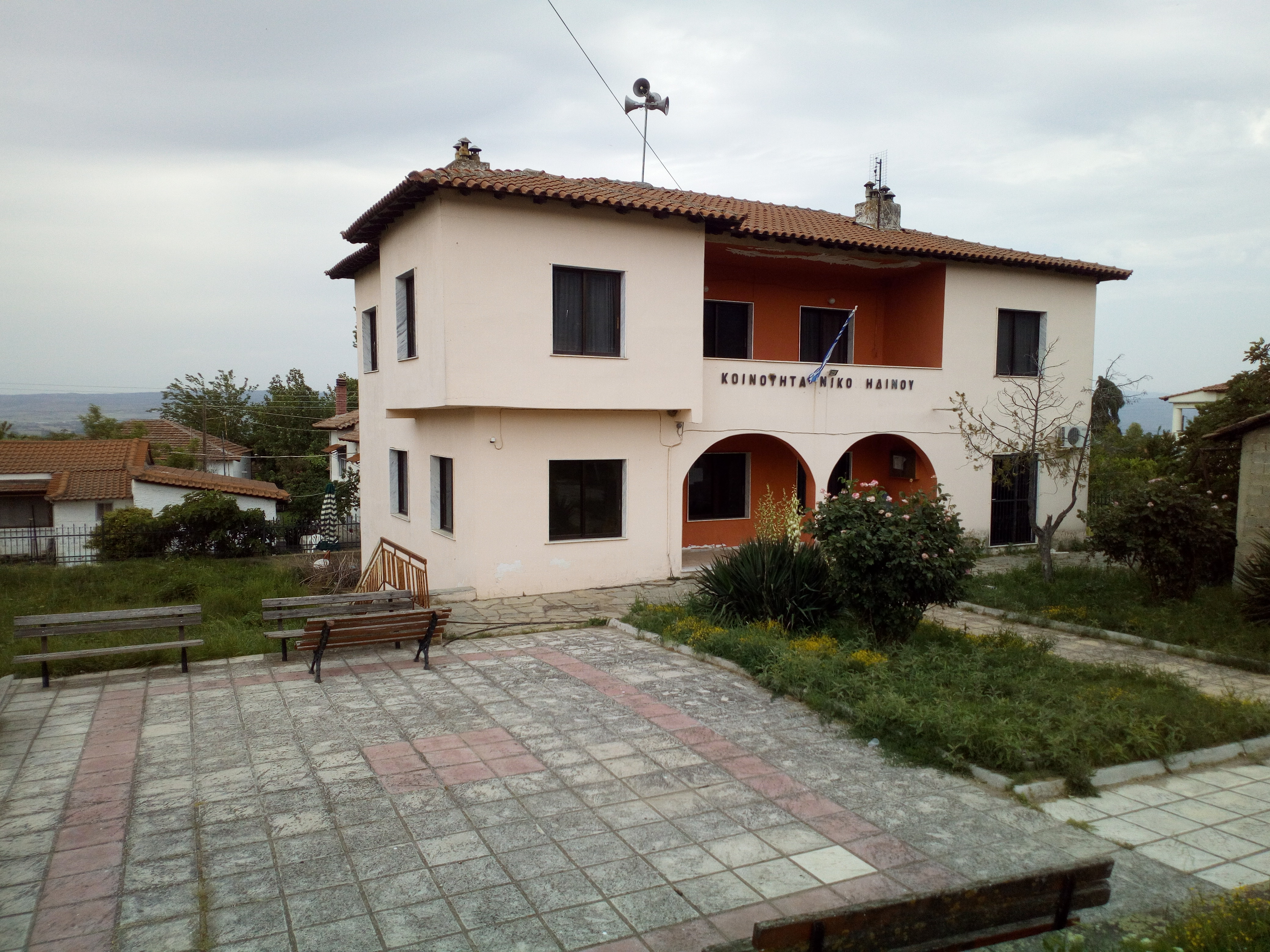 Το κτήριο της κοινότητας χρησιμοποιείται και σαν αποθηκευτικός χώρος της ιστορίας του χωριού.